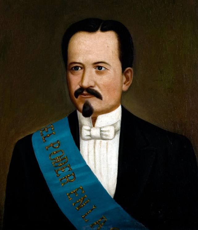 Antonio María Vicente Narciso Borrero y Cortázar (29 October 1827 – 9 October 1911)